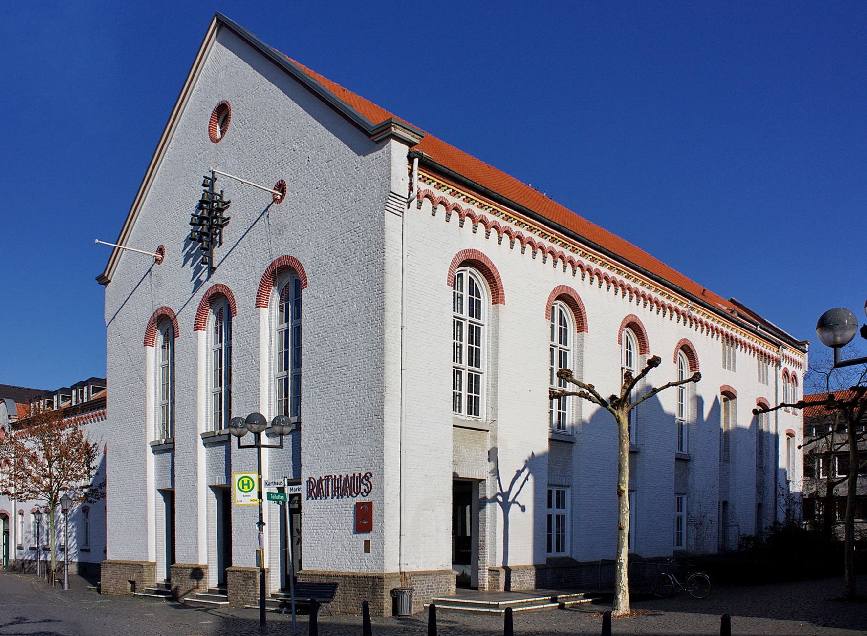 Rathaus in Xanten, Nordrhein-Westfalen, Deutschland